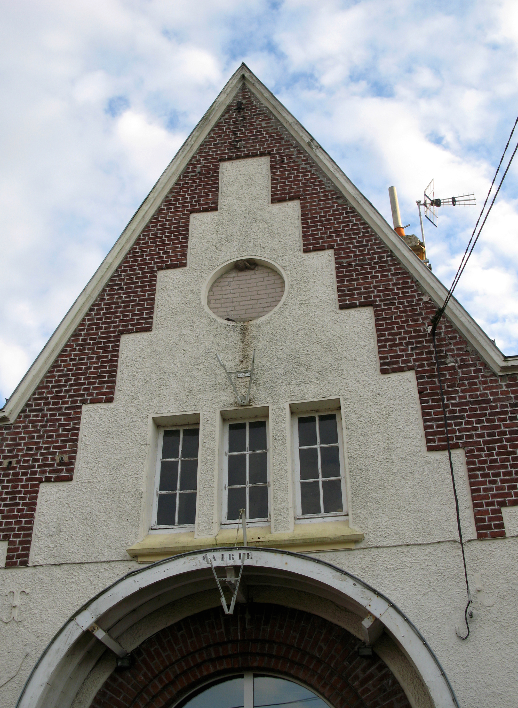 Vendelles (Aisne, France)